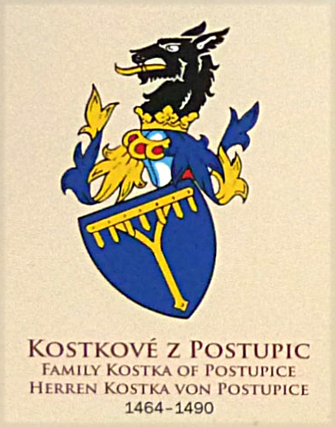 Besitzer der Herrschaft Mährisch Trübau (Moravská Třebová) Wappen der Herren Kostka von Postupitz (Kostkové z Postupic)